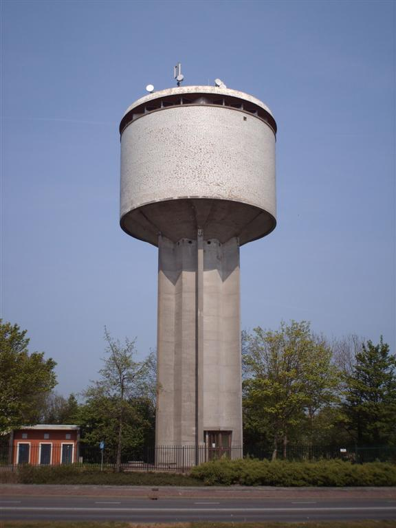 Watertoren Dokkum